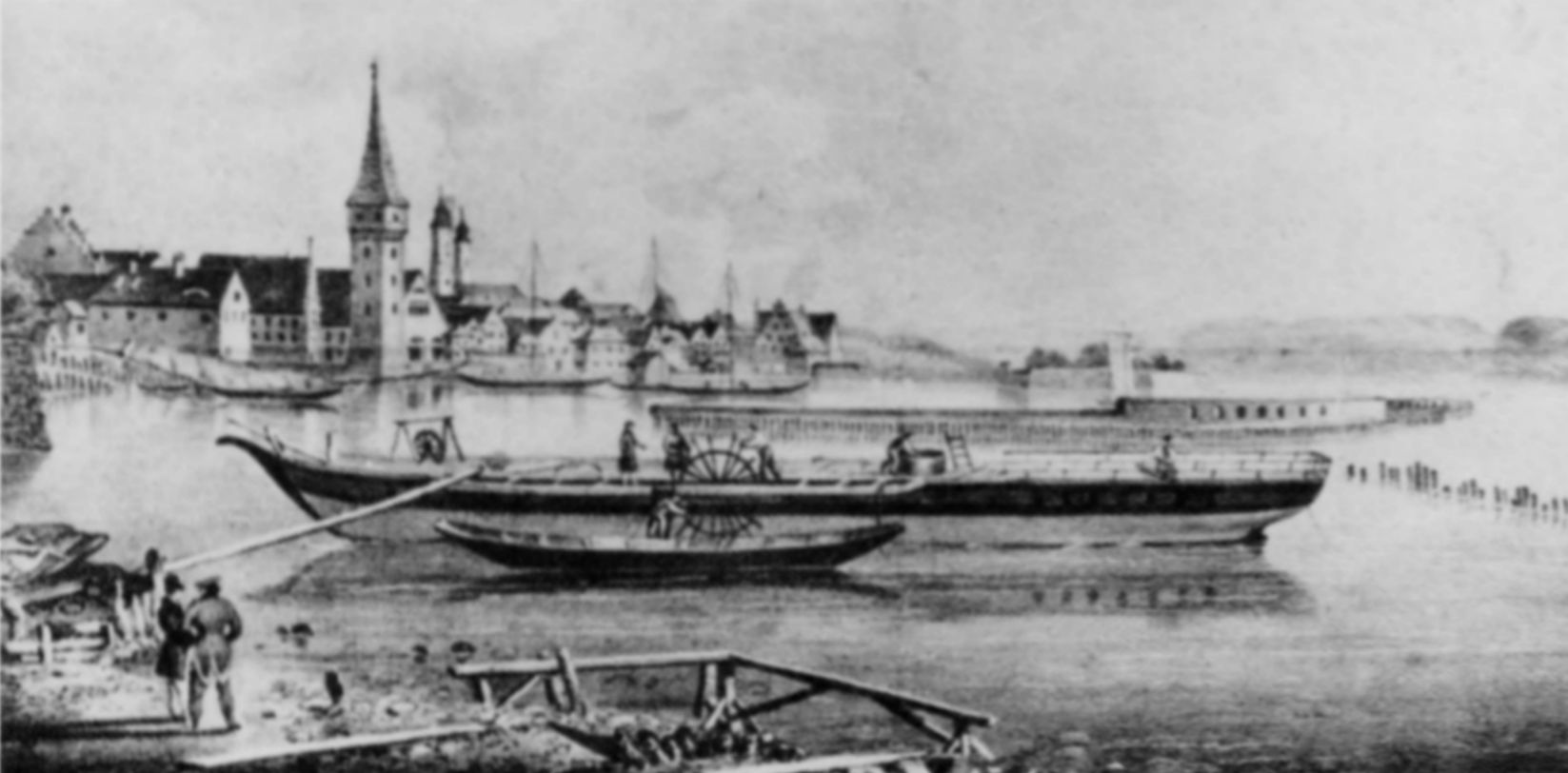 Stapellauf des Dampfers Ludwig